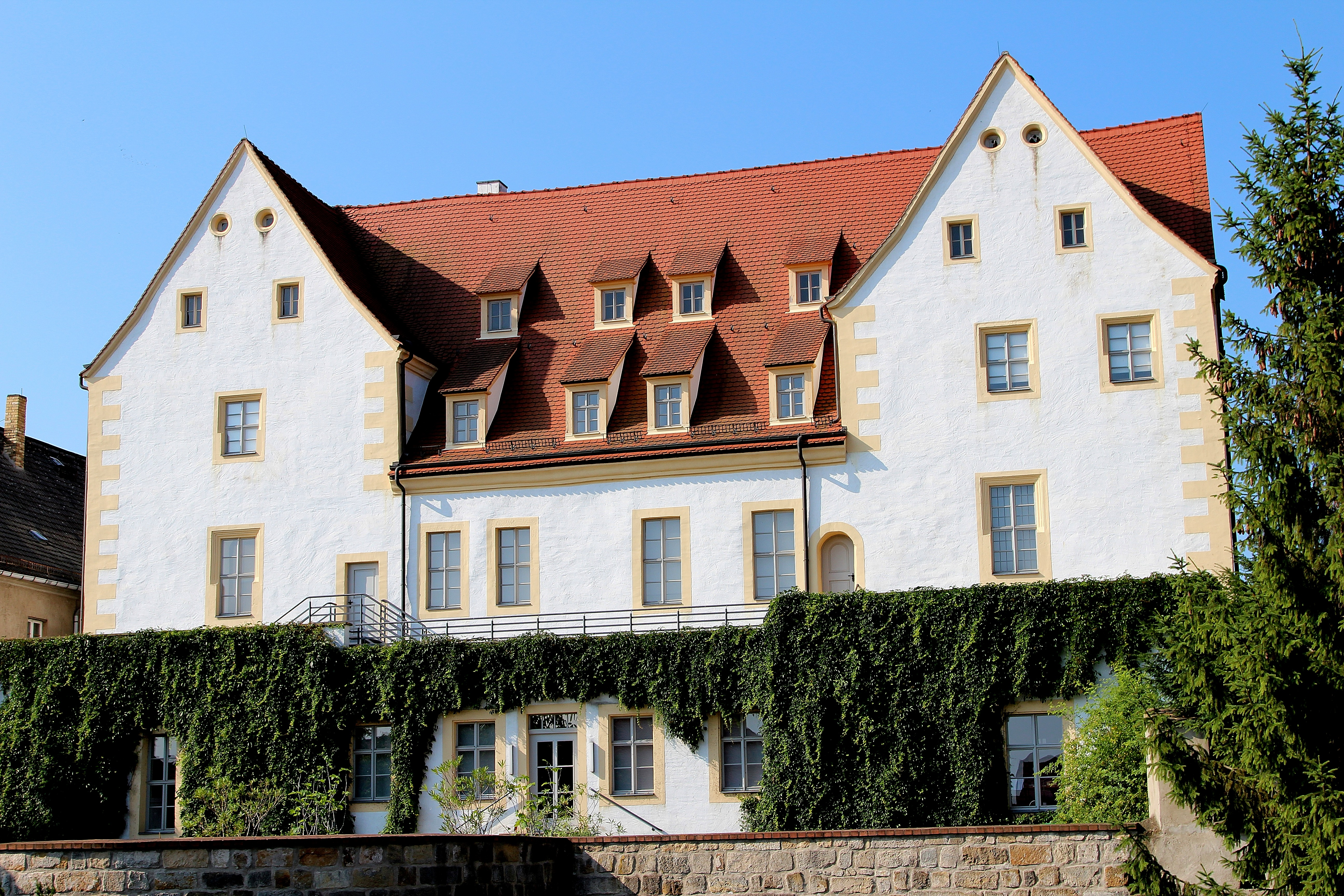 Kurfürstliche Kanzlei (2016)